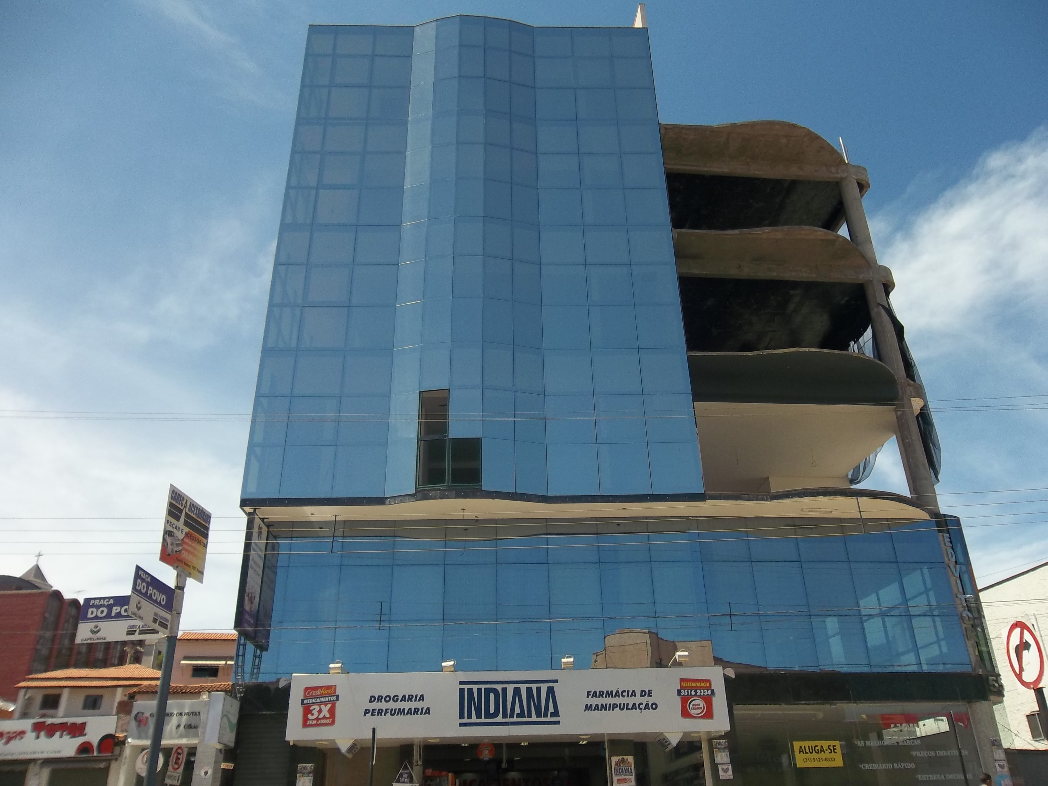 Moderna Edificação na Rua Governador Valadares.